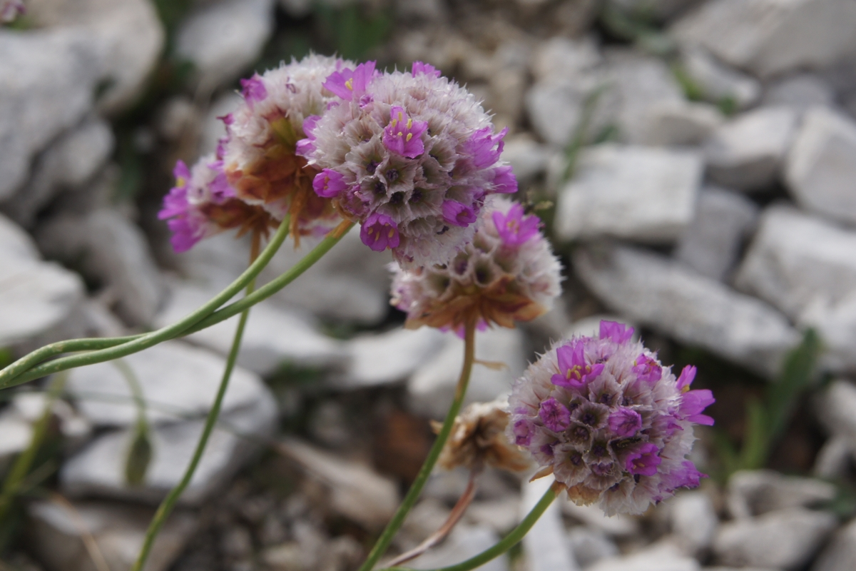 Alpski pečnik na Planini Leskovca.